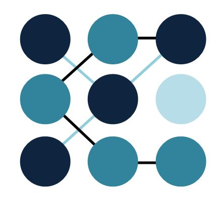 логотип программы "Умные сети"